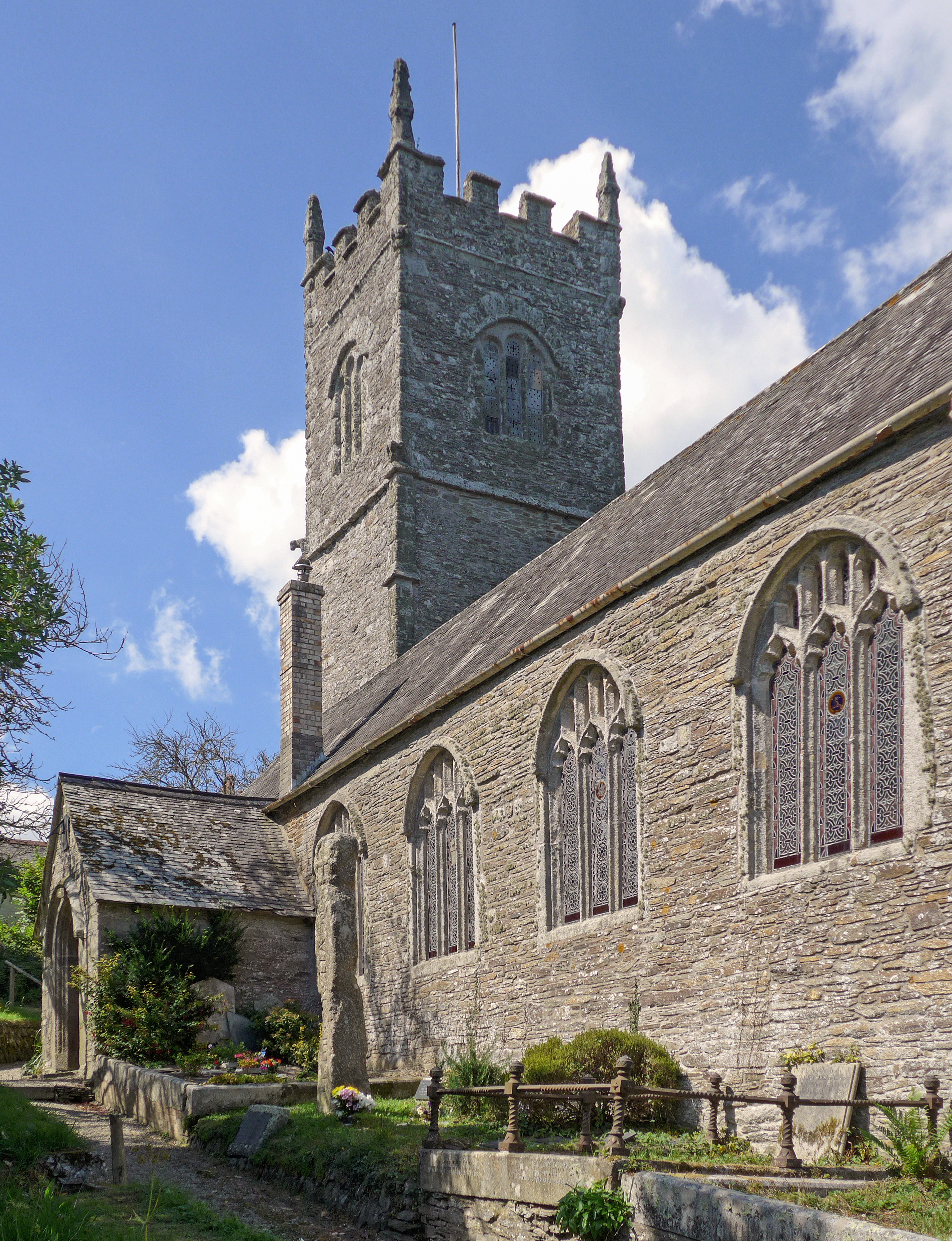 St Clement